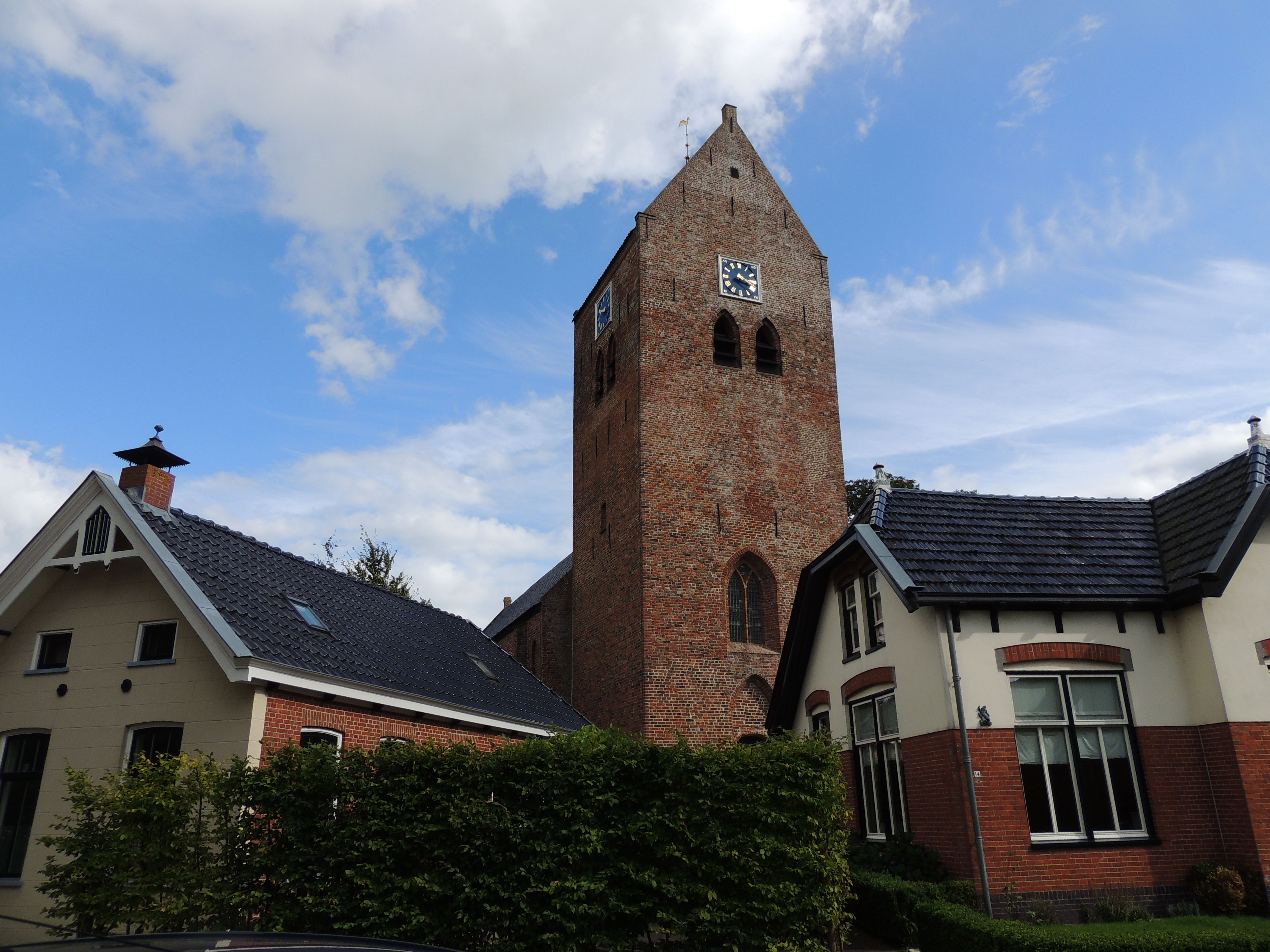 Kerktoren tussen de huisjes